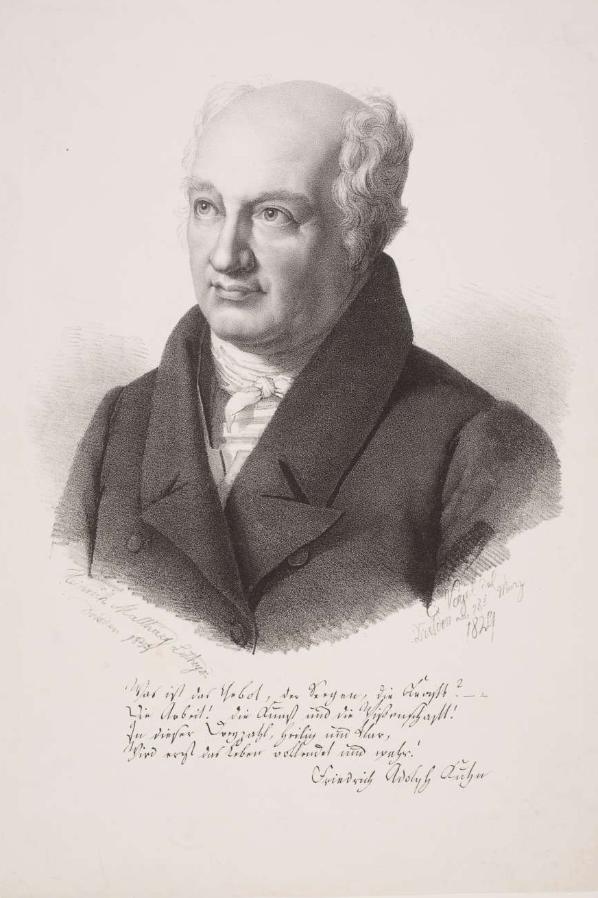 Rechtsanwalt; Dichter und Übersetzer, 1774-1844